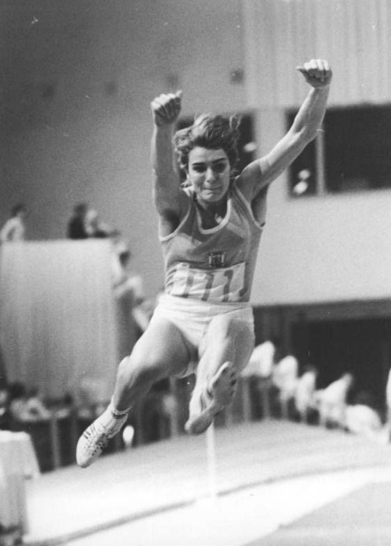 Kristina Albertus ADN-ZB Mittelstädt 12.2.72 Berlin: DDR-Leichtathletik-Hallen-Meisterschaften für Damen und Herren (1. Tag) . Überraschungssiegerin im Weitsprung der Frauen wurde mit guten 6.46 m die Dresdnerin Kristina Albertus vom SC Einheit Dresden.